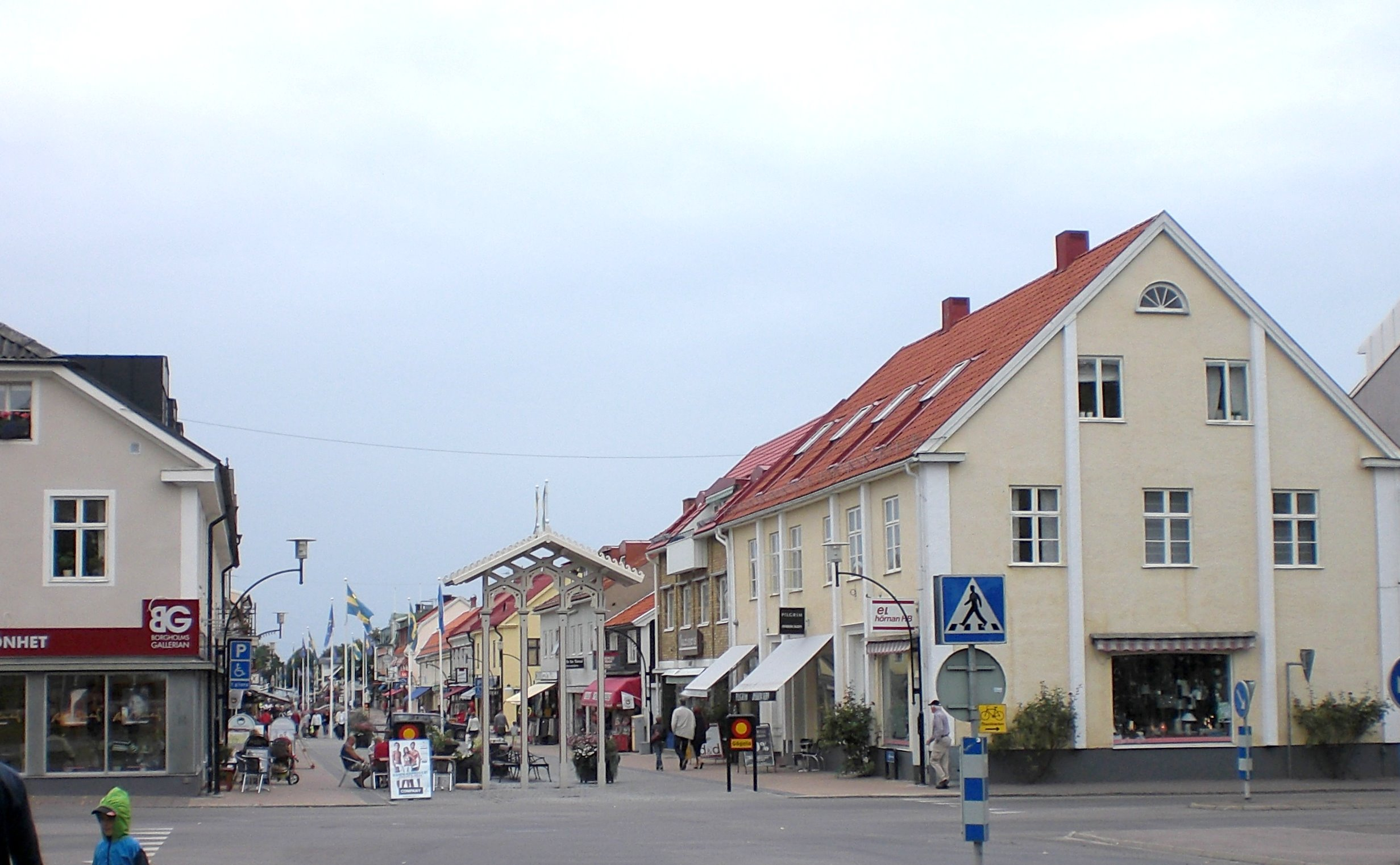 Blick auf die Fussgängerzone von Borgholm, Ostseite